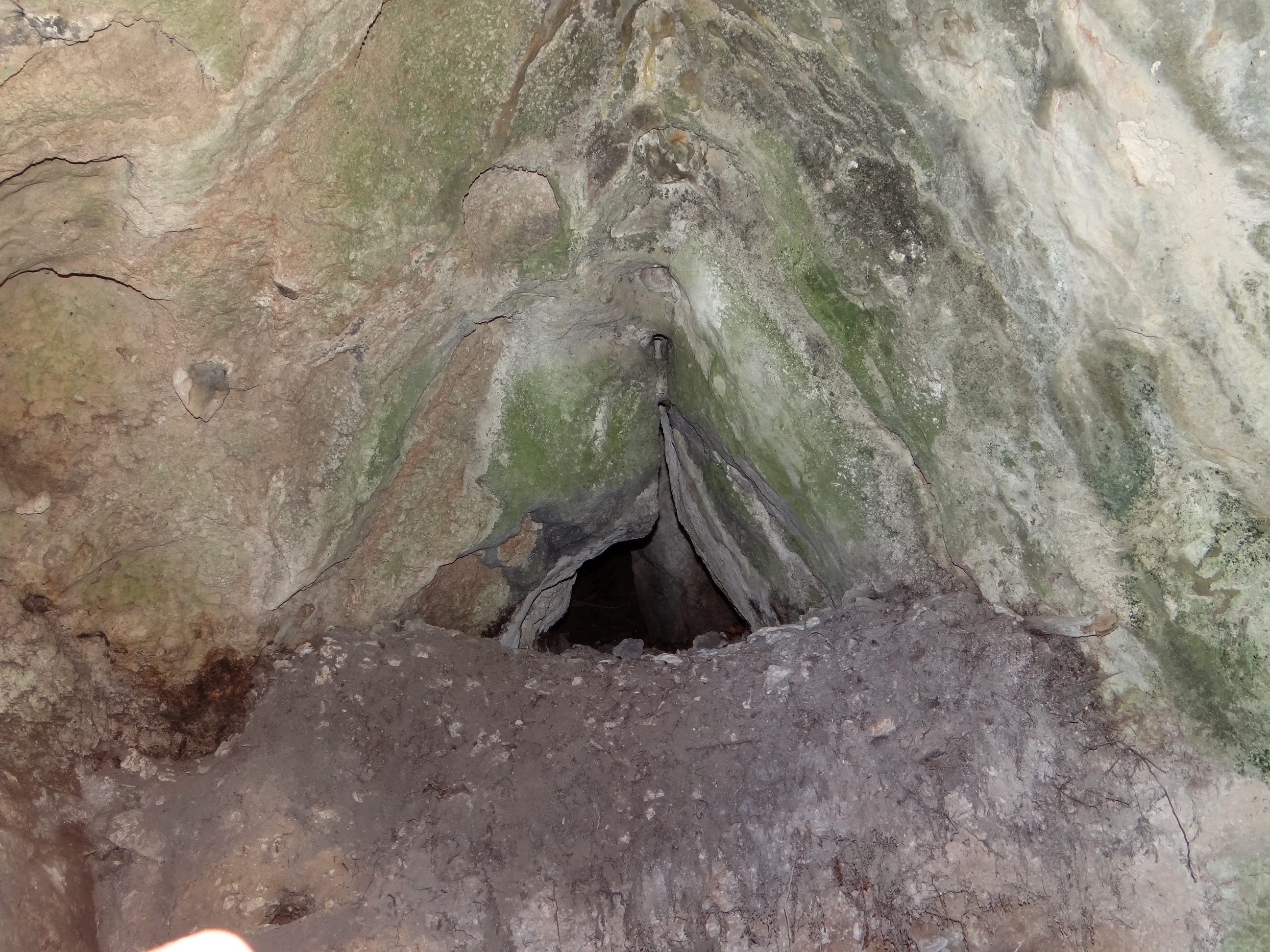 Schronisko w Krużganku na Górze Popielowej w na Wyżynie Częstochowskiej